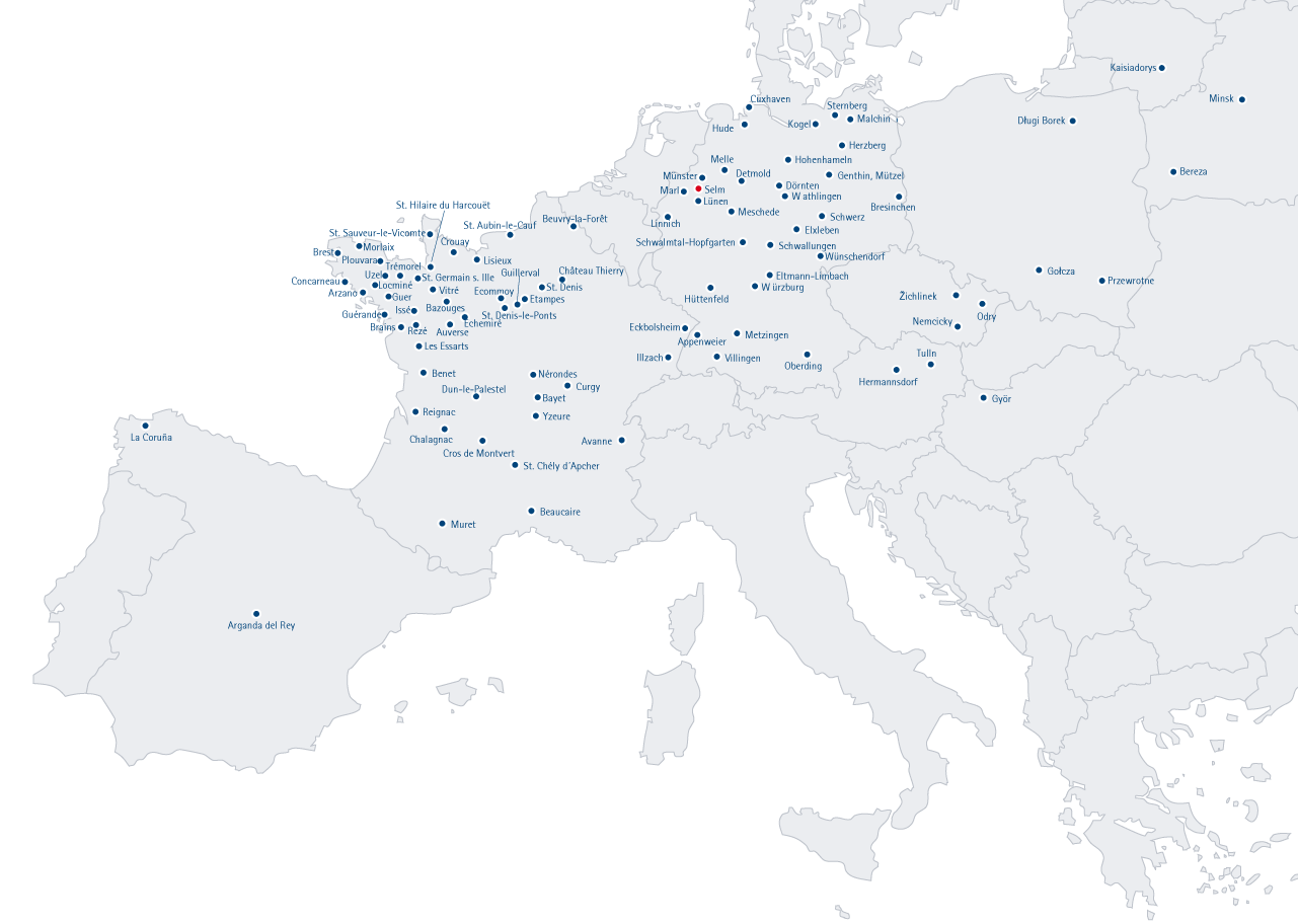 Europastandorte SARIA